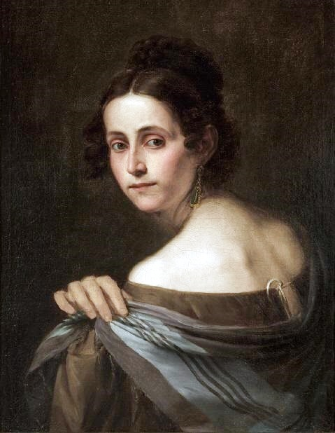 Retrato de Joaquina Bastida y Vargas, que fue la esposa del pintor español José Domínguez Bécquer (1805-1841).